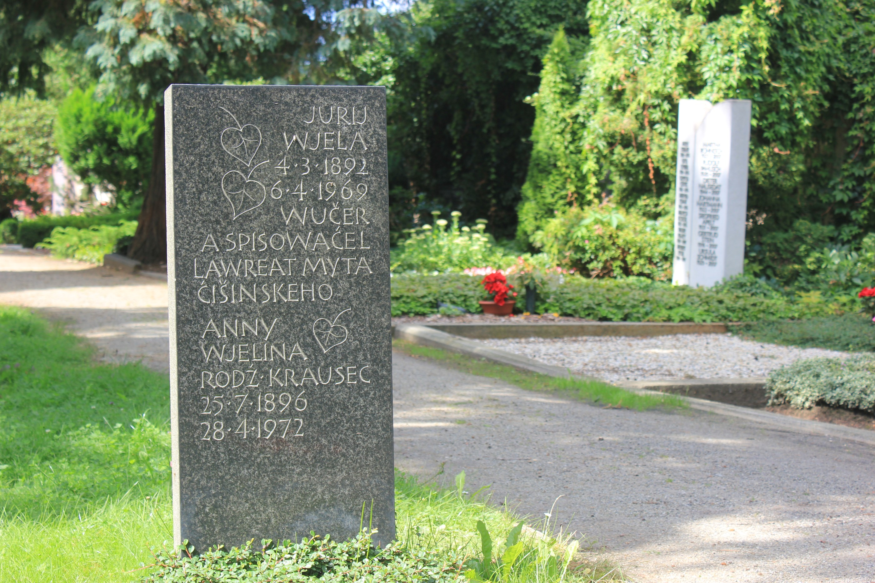 Hornjoserbsce: Row Jurja Wjele na Tuchorskim kěrchowje.